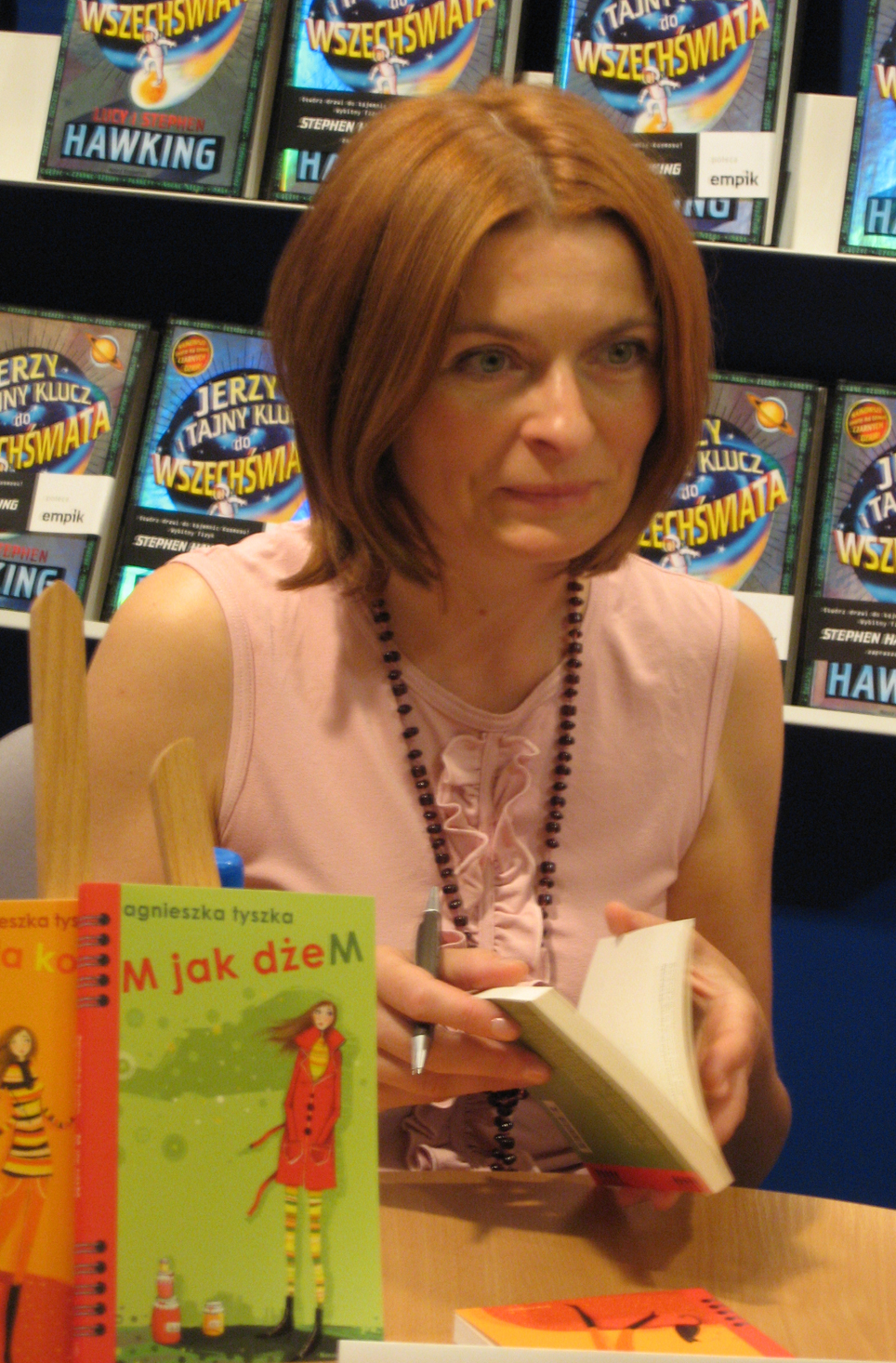 53. Międzynarodowe Targi Książki w Warszawie - Agnieszka Tyszka (2008-05-17).